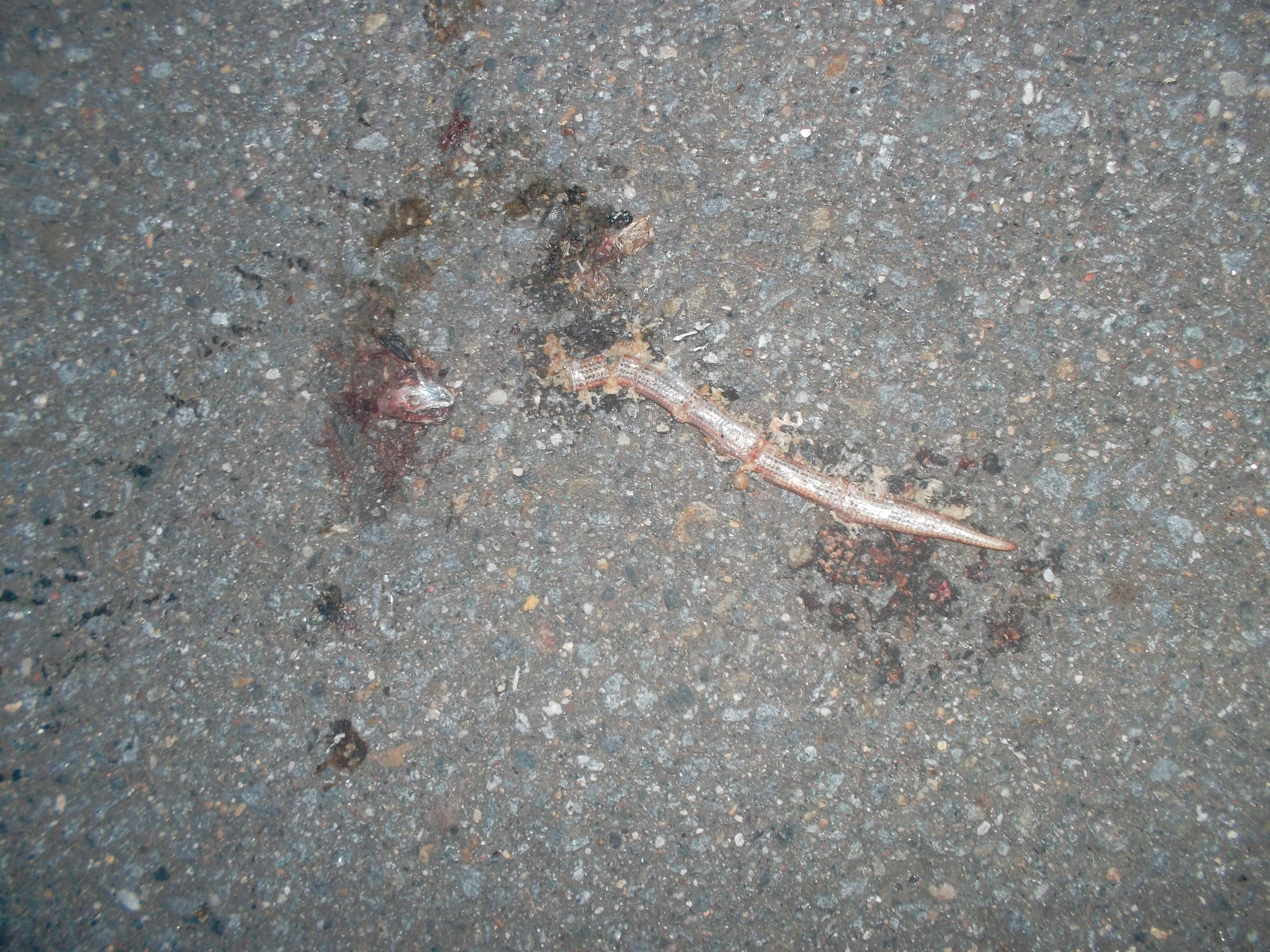 Straßenverkehrsopfer Blindschleiche